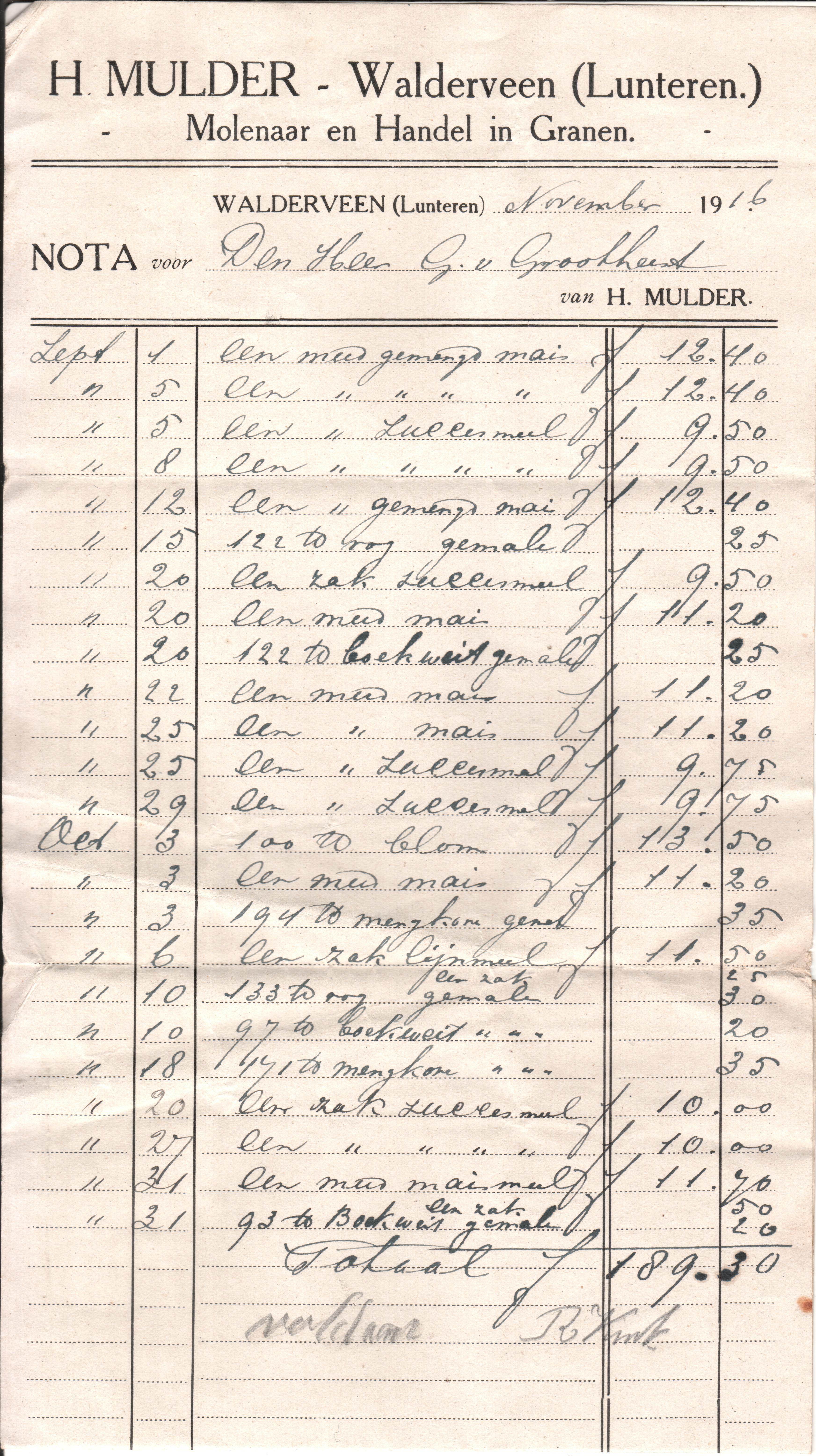 Een rekening uit 1916 voor meelverkoop en maalloon. 122 lb= 122 pond, lb=libra